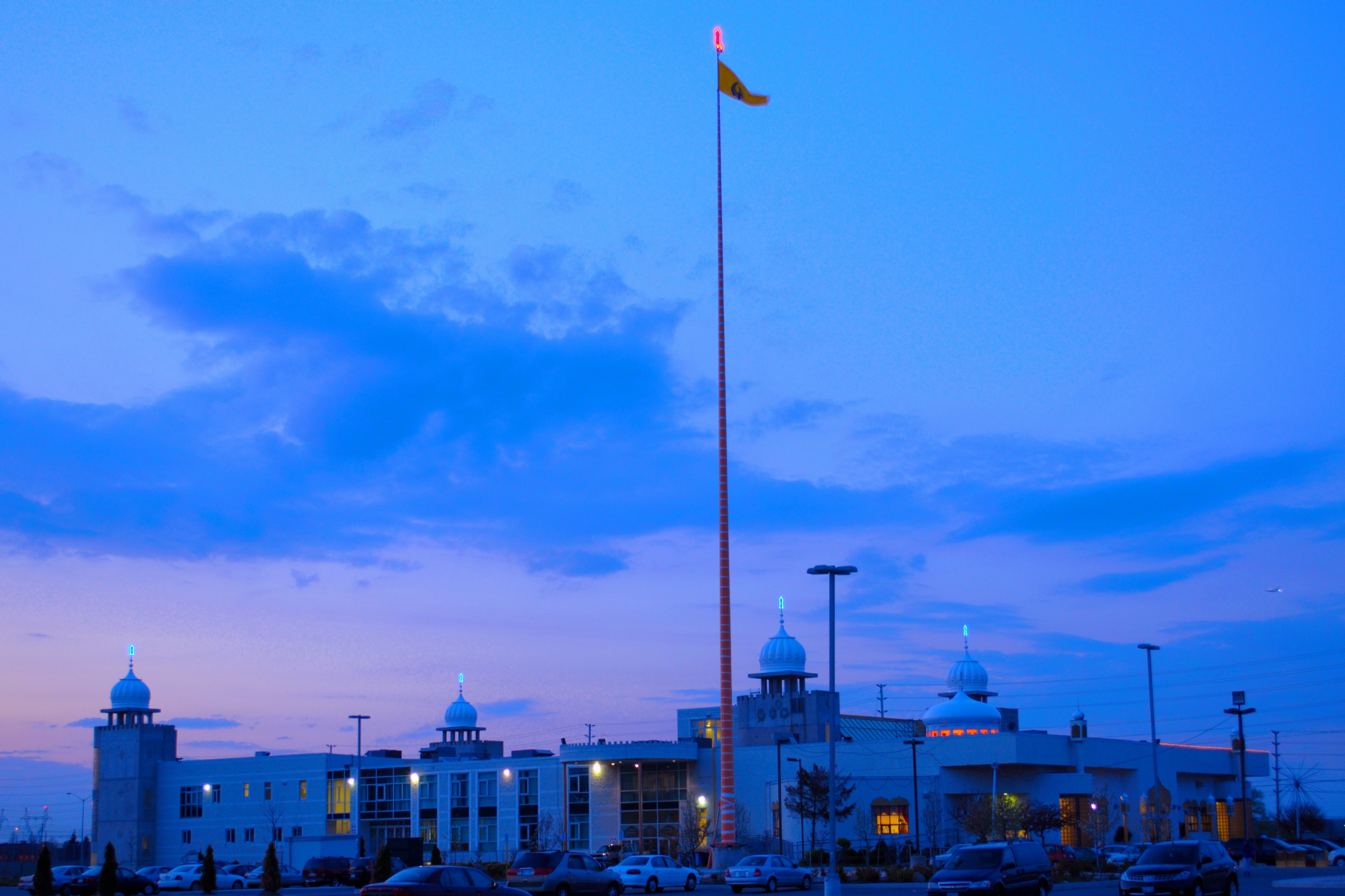 Ontario Khalsa Darbar, Dixie Road Gurudwara, Mississauga, Canada.